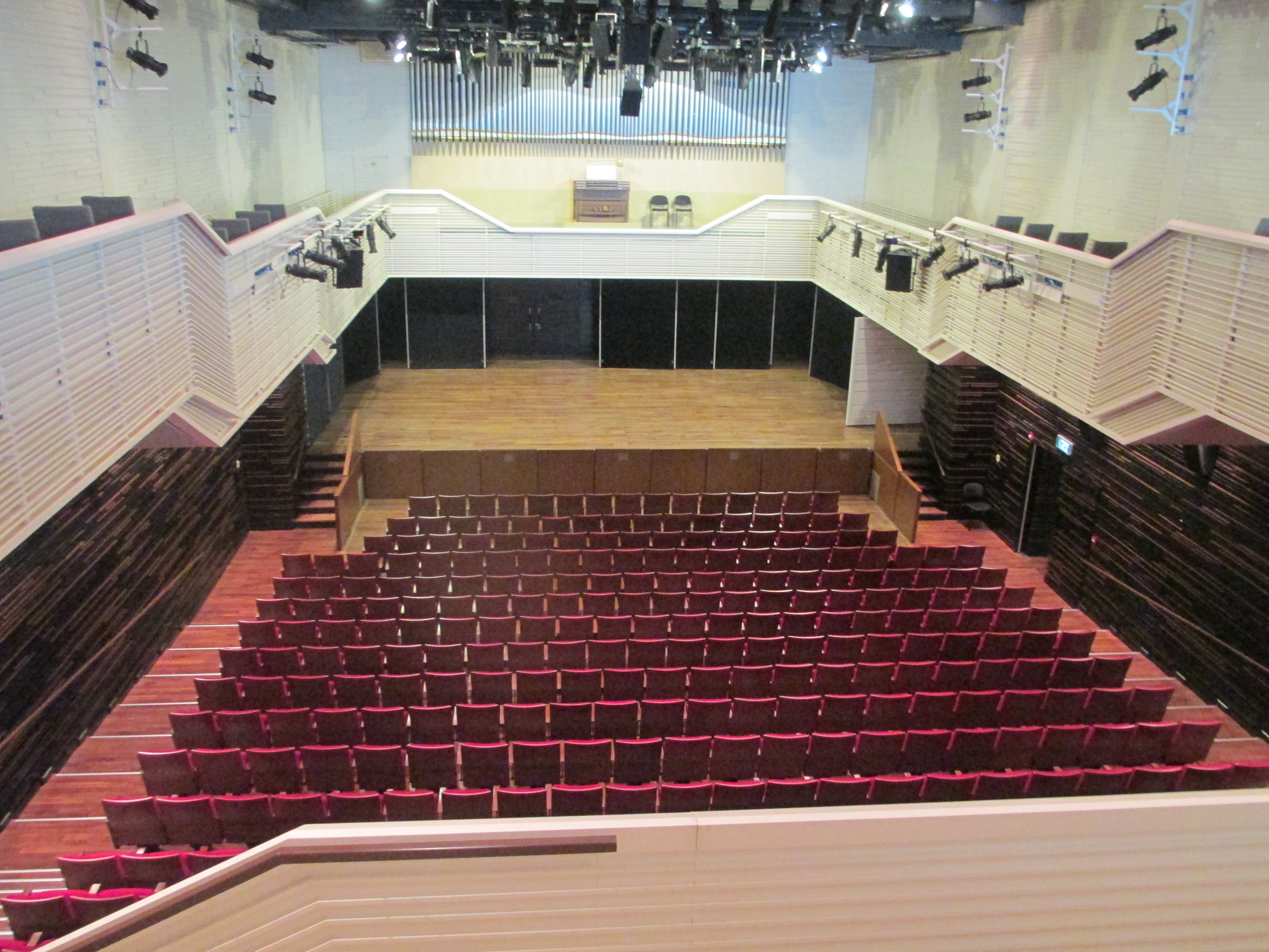 אולם המופעים אלמא במלון אלמא